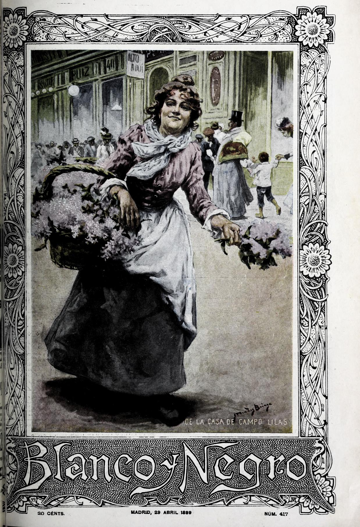 Portada de Narciso Méndez Bringa.